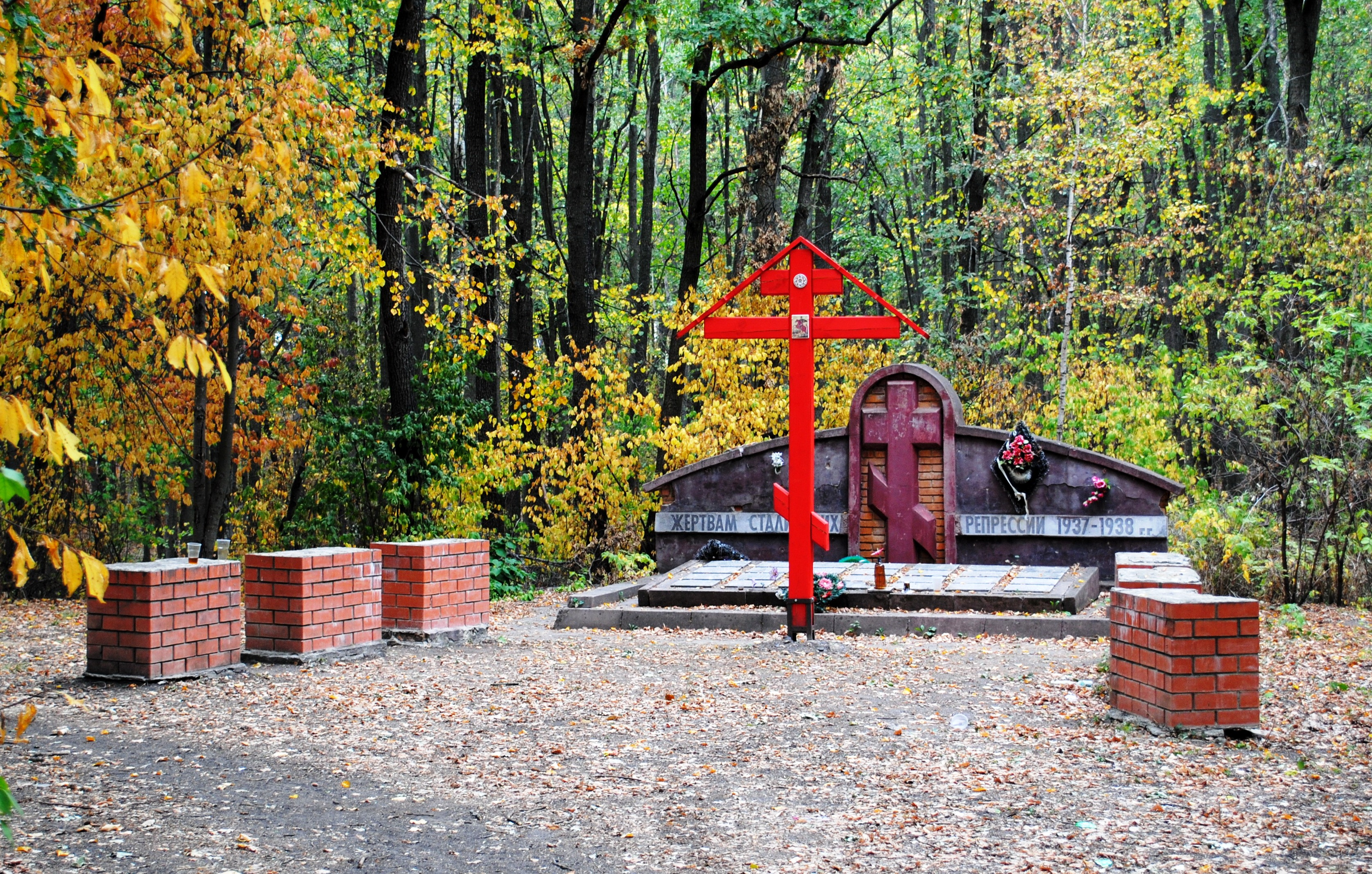 Липовчик